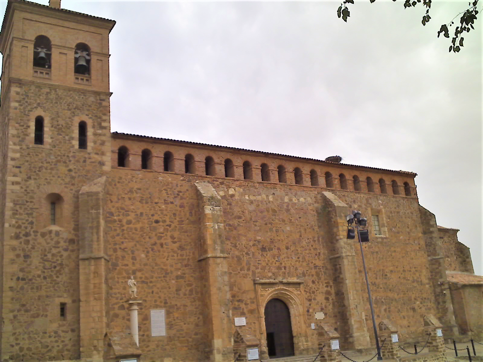 Iglesia de Nuestra Señora de la Asunción en el Viso del Marqués (Provincia de Ciudad Real - España) de estilo transición gótico-renacentista, fue levantada en el siglo XV.